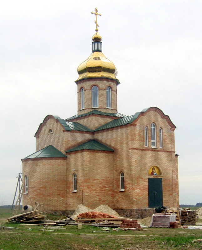 Будівництво церкви в Ясногородці